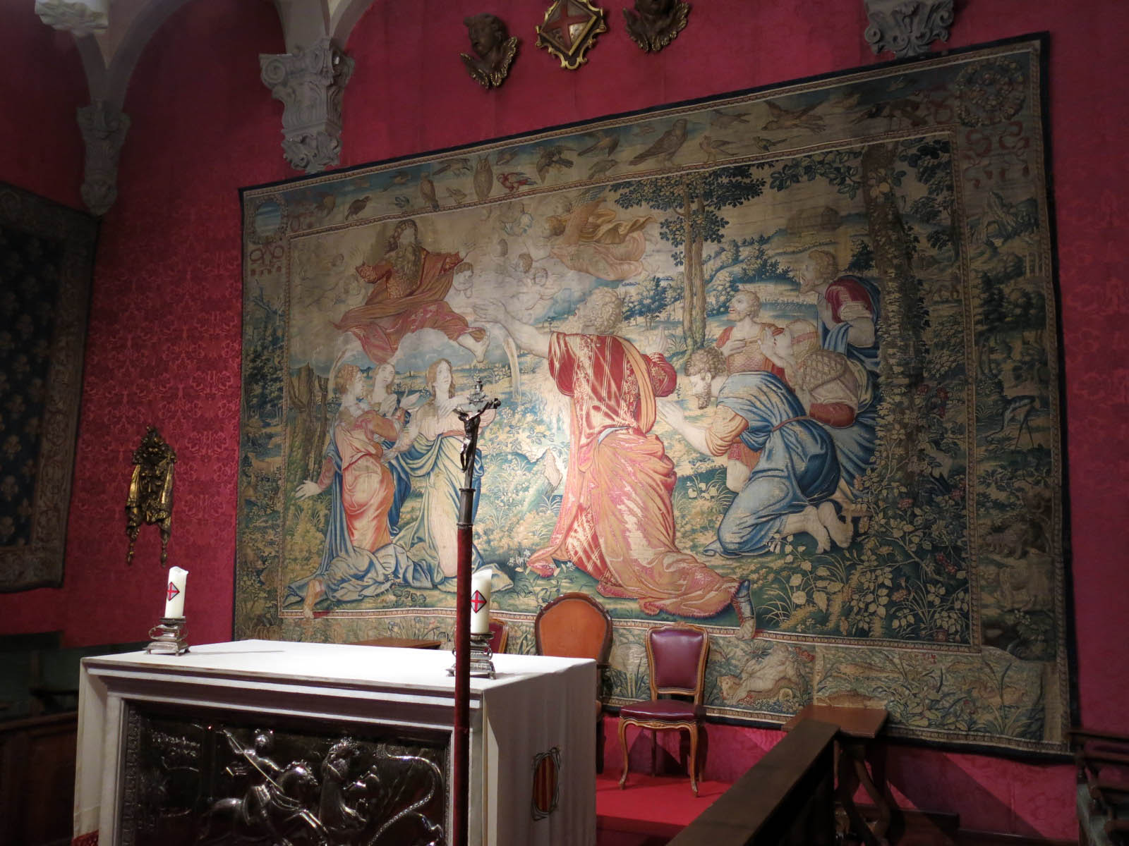 Palau de la Generalitat (Barcelona) Object location41° 22′ 58.01″ N, 2° 10′ 36.01″ E